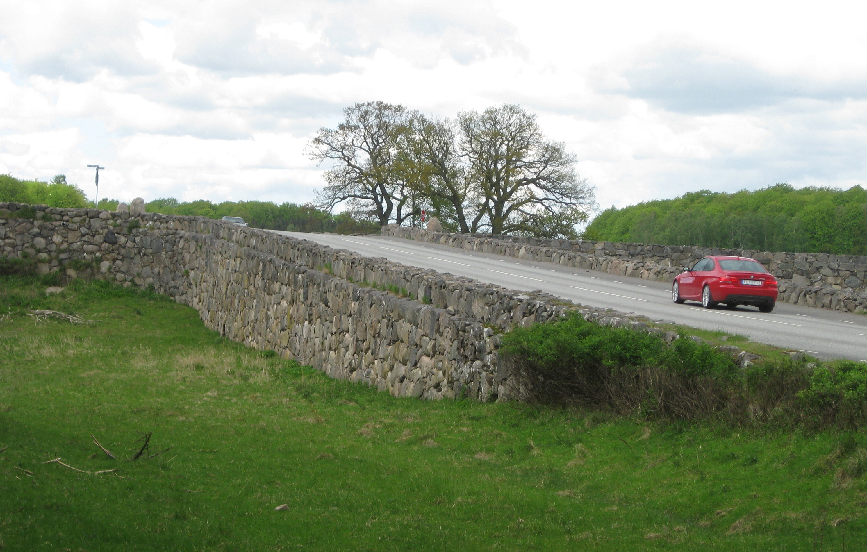 Den spektakulära vägen till Maltesholm